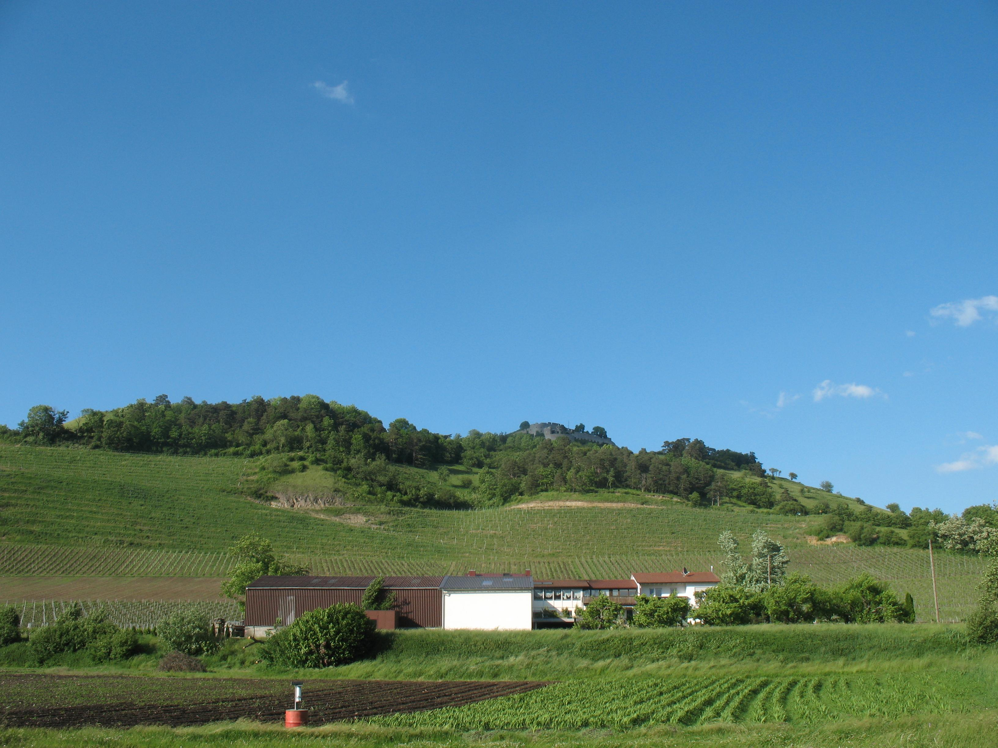 Blick von der Bundesstraße B314 auf das höchste Weinanbaugebiet Deutschlands: "Elisabethenberg" (Weingut Vollmeyer) an den Südwest-Hängen des Hohentwiel.